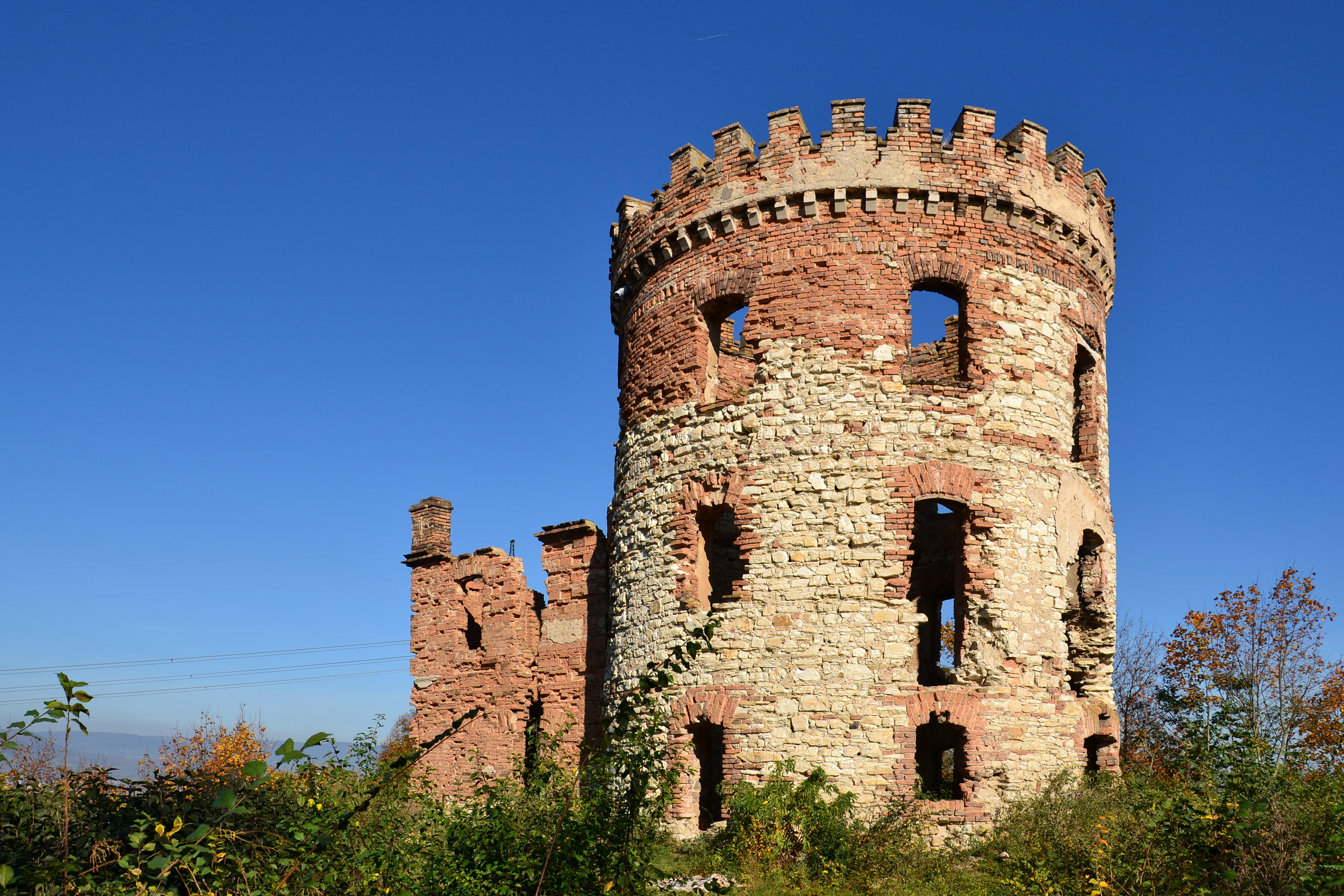 Větrný mlýn Windsor, Siřejovice.